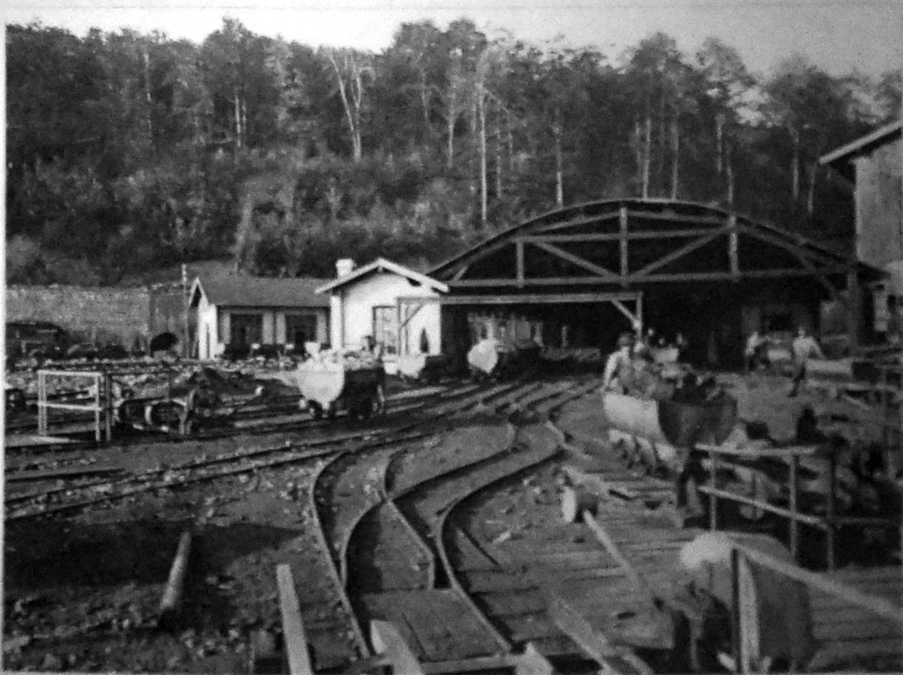 sur une vue ancienne.